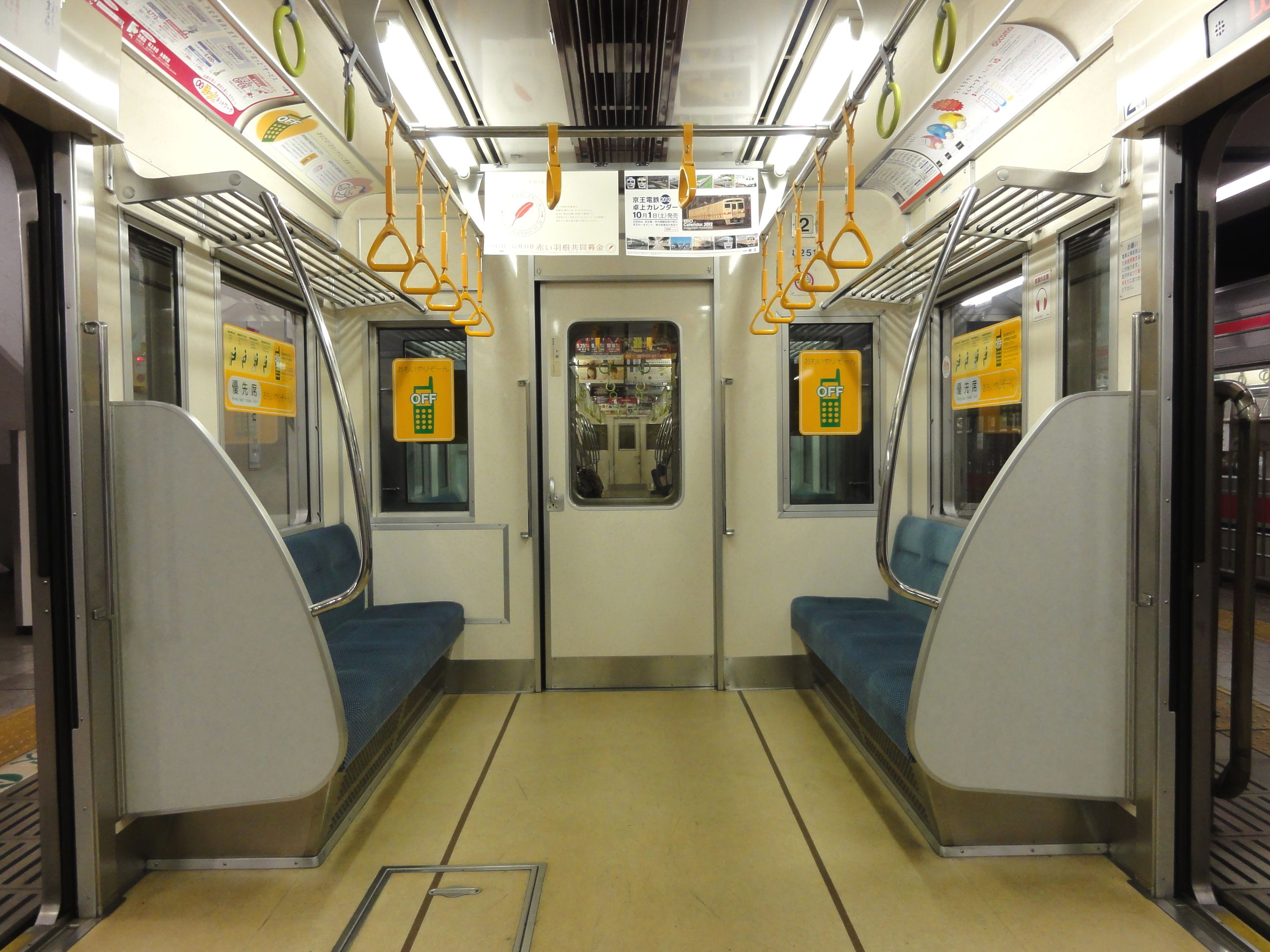 京王8000系電車車内優先席部（おもいやりぞーん）